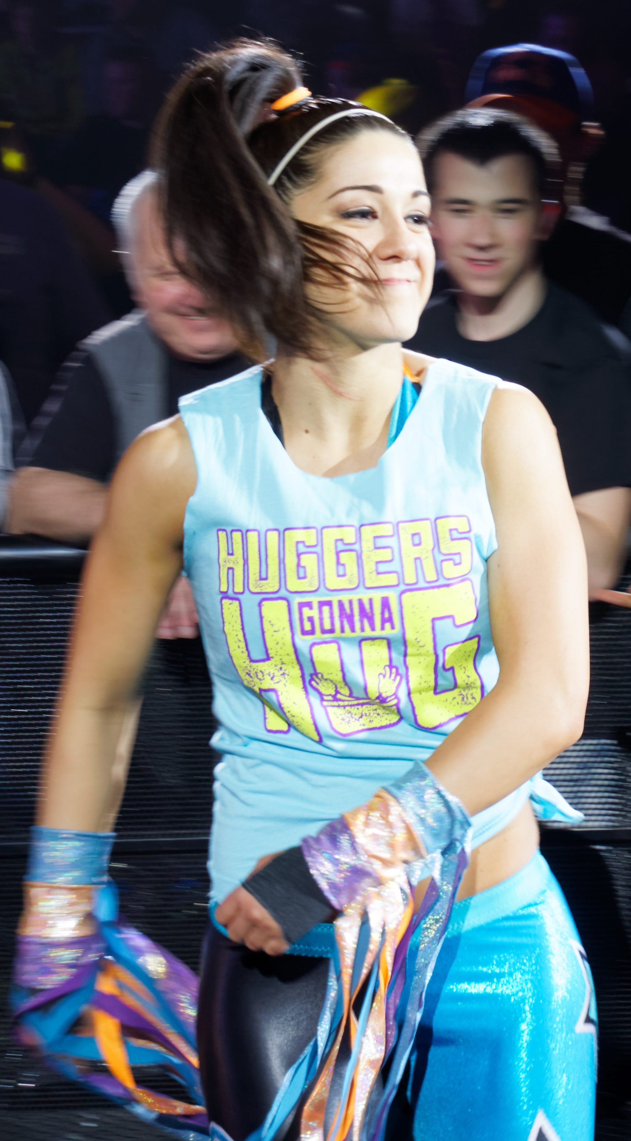 P_20170201_191226_002